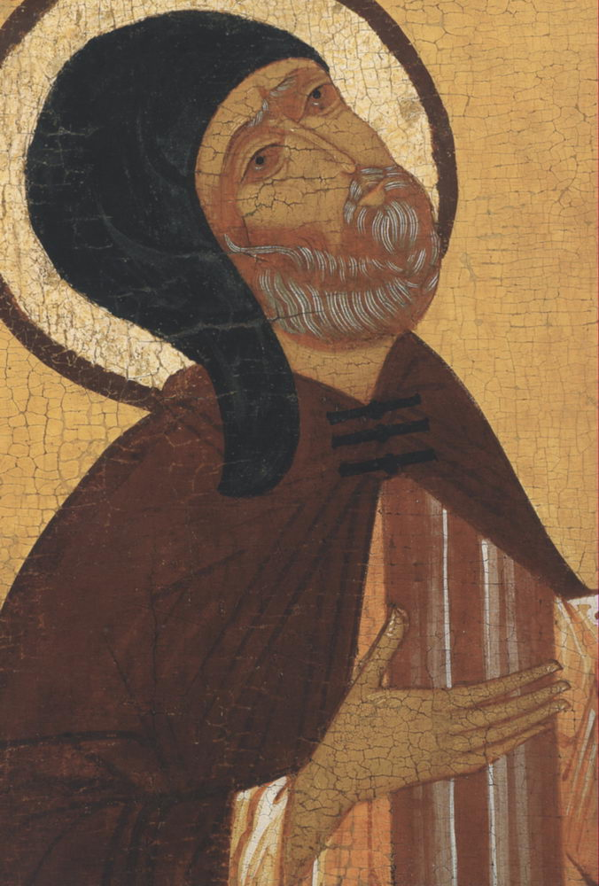 Князь муромский Петр (икона XVI в)